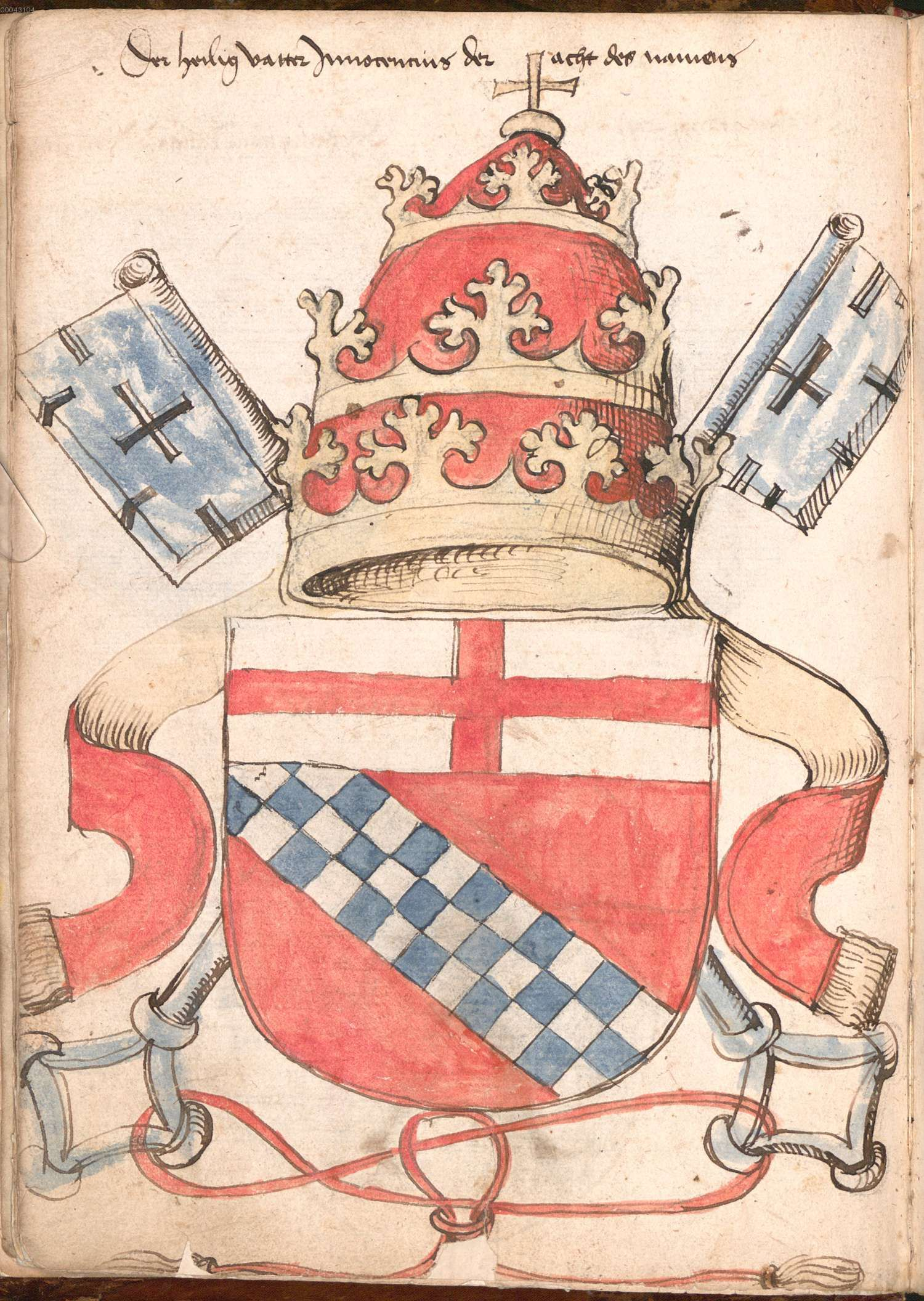 „Wernigeroder (Schaffhausensches) Wappenbuch“; Süddeutschland 4. Viertel 15. Jh. Bayerische Staatsbibliothek München, Cod.icon. 308 n Wappen ideeller Vorfahren und Wappen höchster weltlicher und geistlicher Würdenträger der heilige Innocensius der Achte des Namens